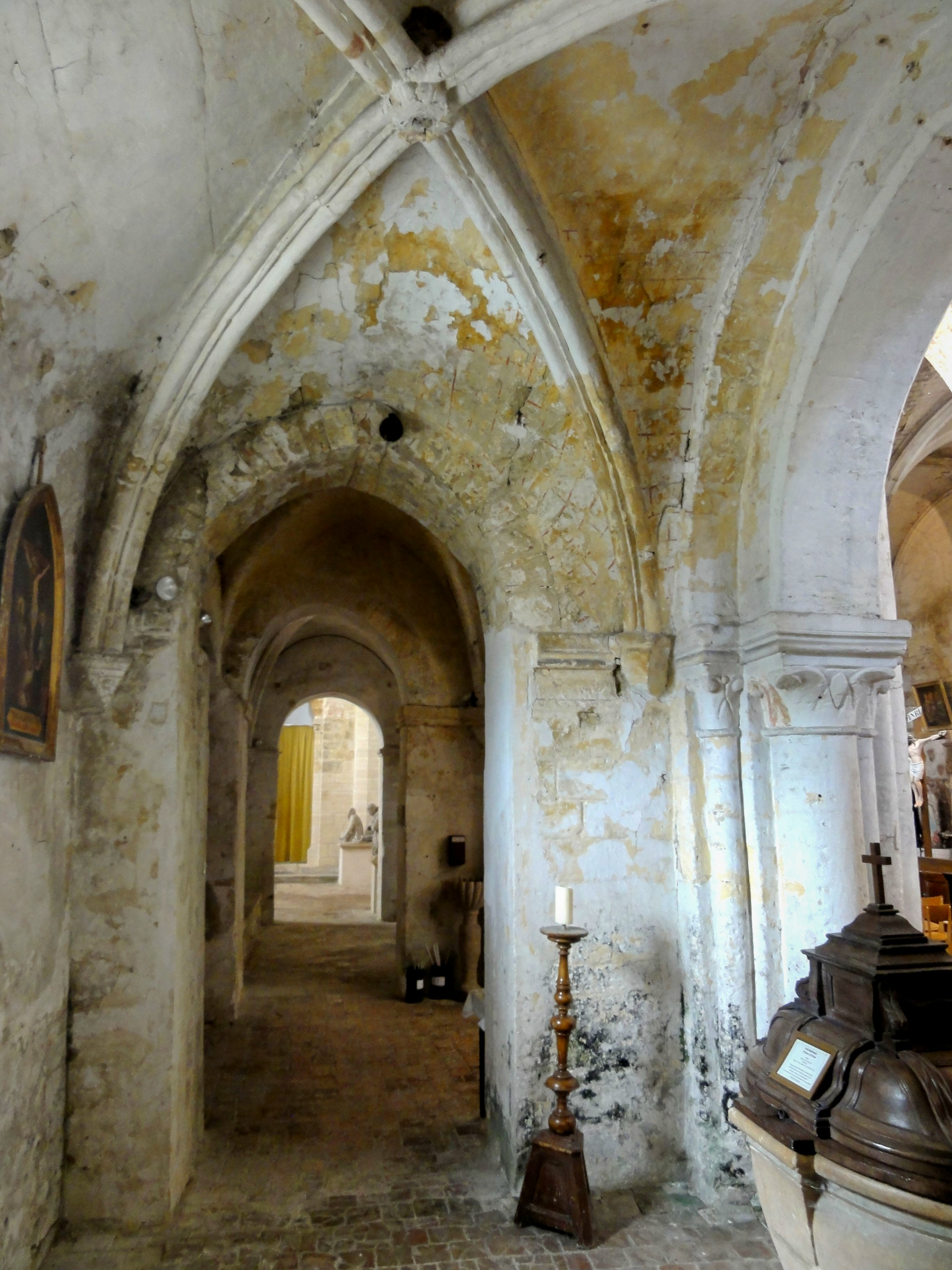 Seconde travée du bas-côté nord, côté est.